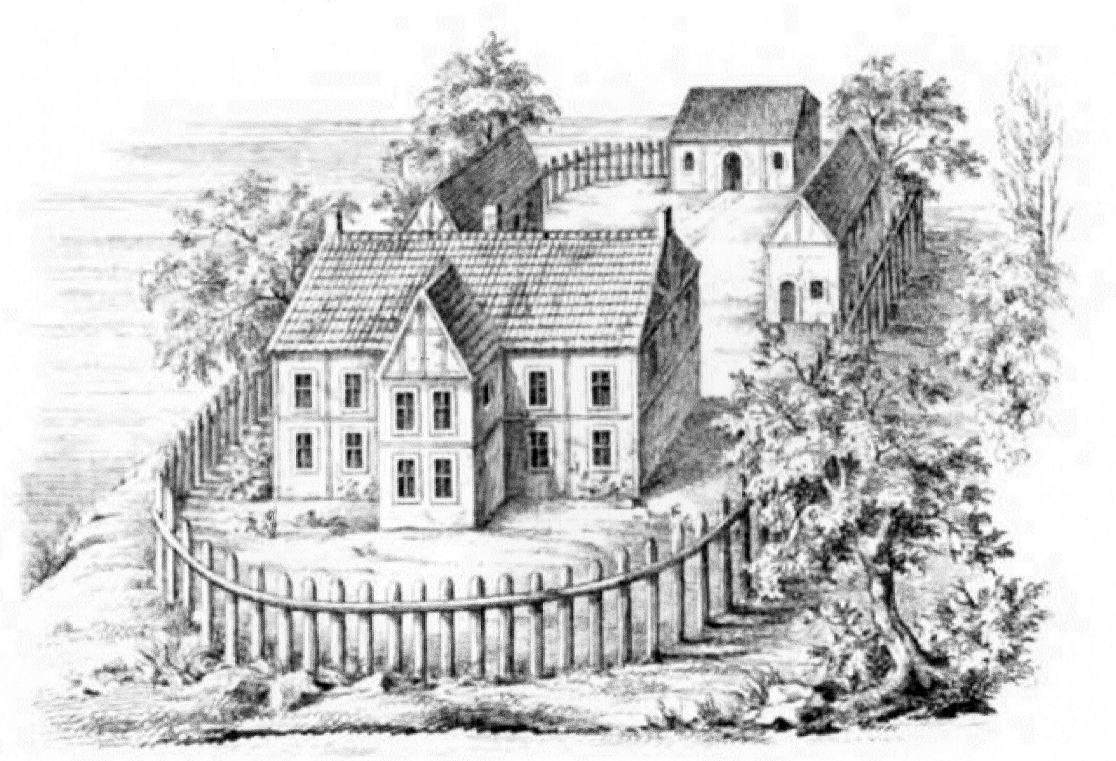 Das alte Gut Nehmten, Zeichnung von Köhler und Roisternitz 1862